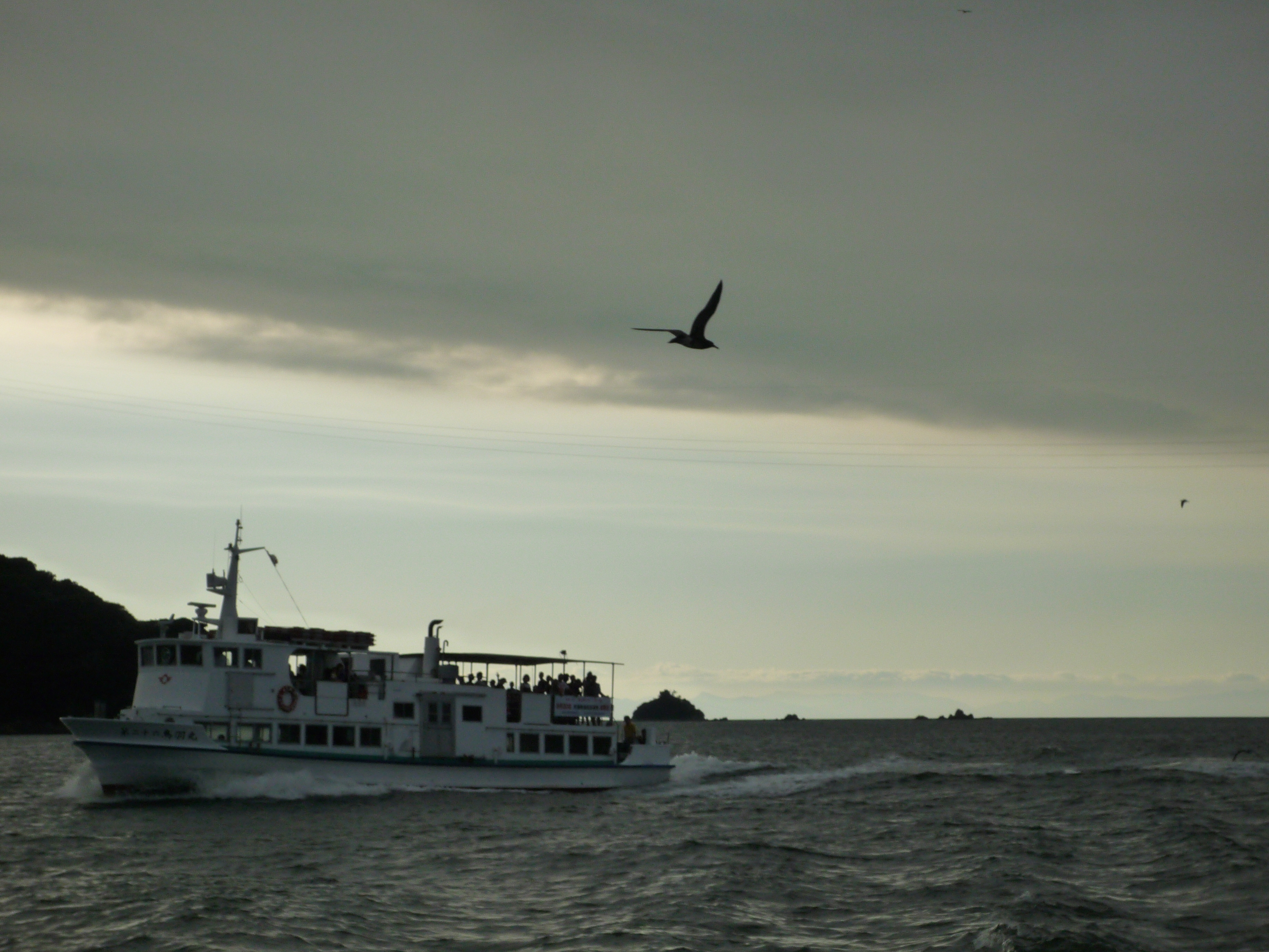 三重県鳥羽市 鳥羽湾 漁船とカモメ